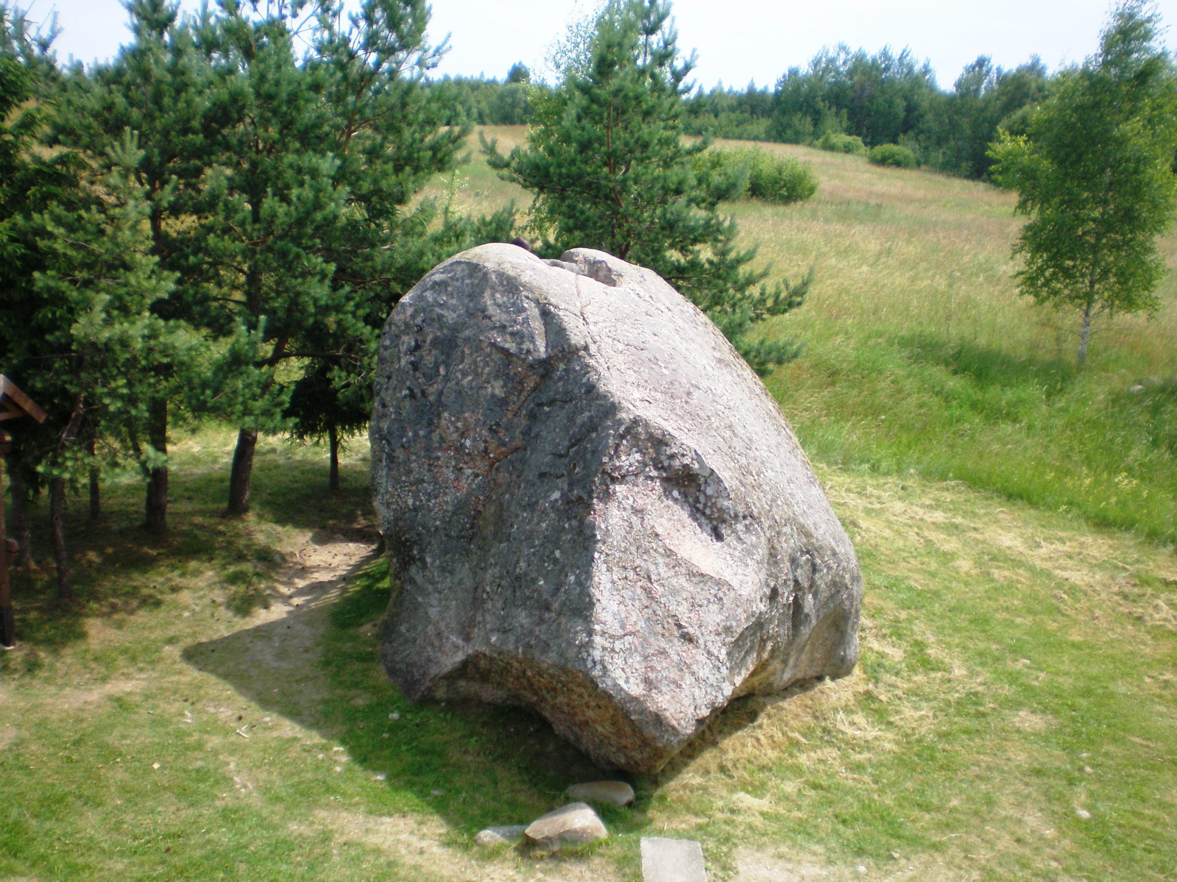 Vištyčio akmuo, Vilkaviškio raj.